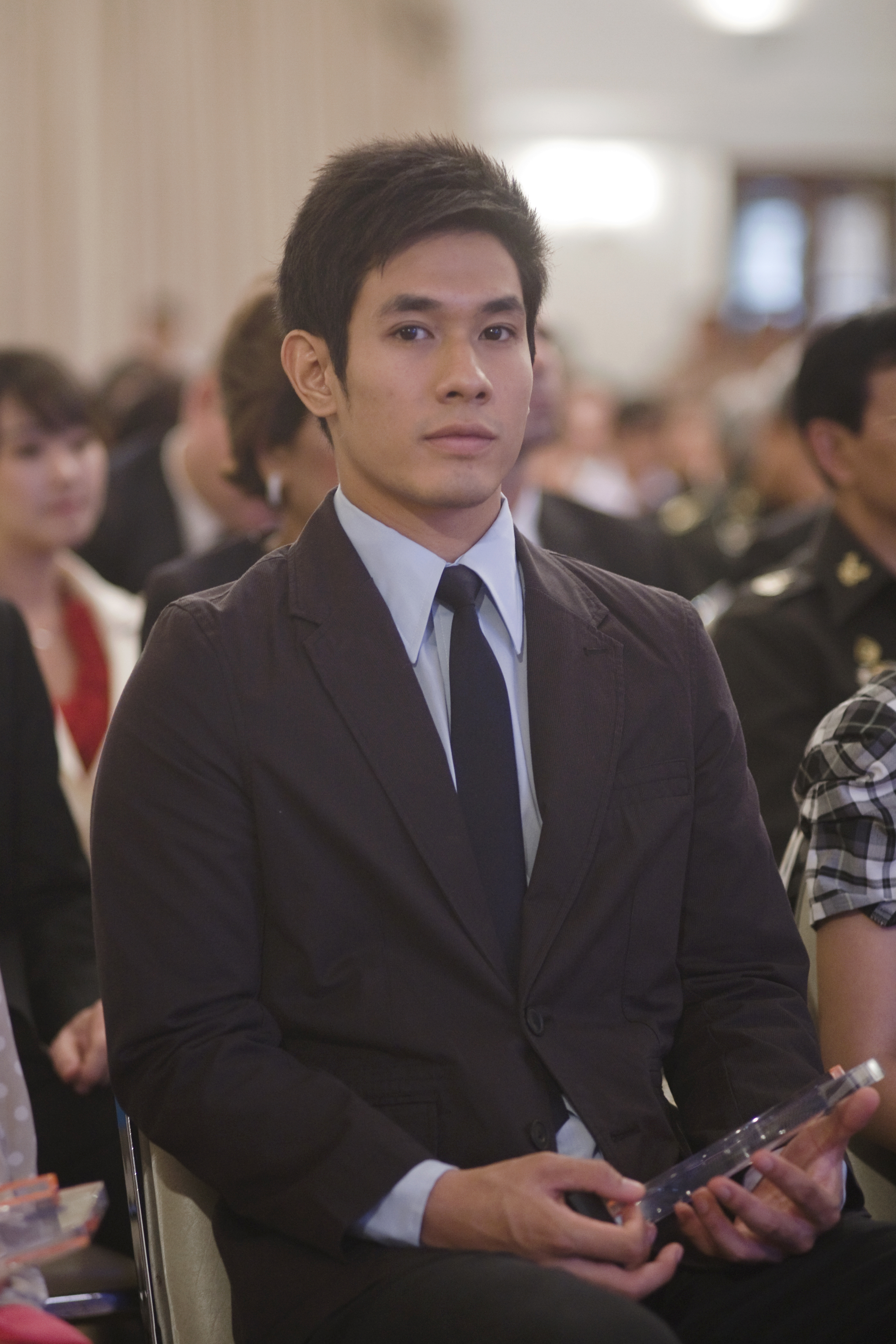 นายกรัฐมนตรี เป็นประธานพิธีมอบโล่ "ประกาศเกียรติคุณบุคคลและองค์กรที่มีผลงานยอดเยี่ยมและดีเด่นในการป้องกันและแก้ไขปัญหายาเสพติด ประจำปี 2553" ณ ตึกสันติไมตรี ทำเนียบรัฐบาล วันที่ 25 มิถุนายน 2553 (The Official Site of The Prime Minister of Thailand Photo by พีรพัฒน์ วิมลรังครัตน์)